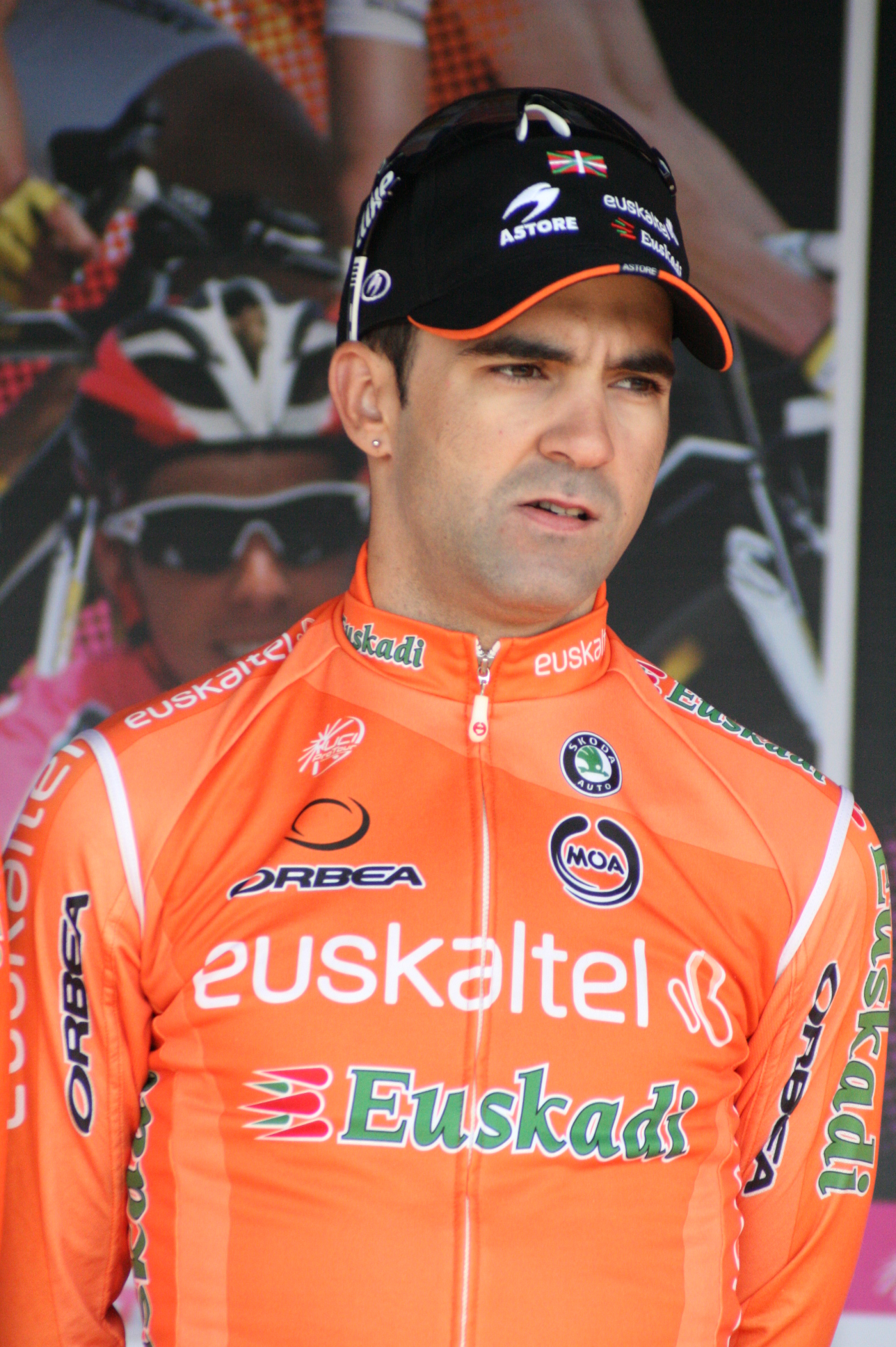 Ruben Perez lors de la présentation des équipes des 4 jours de Dunkerque